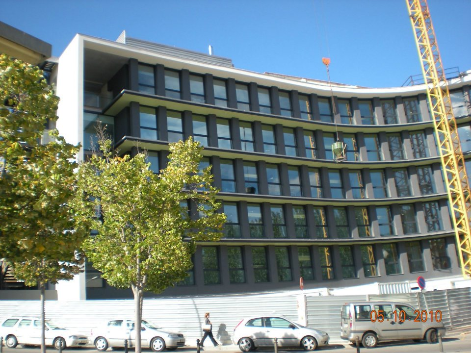 Centre d'Atenció Primària Bages